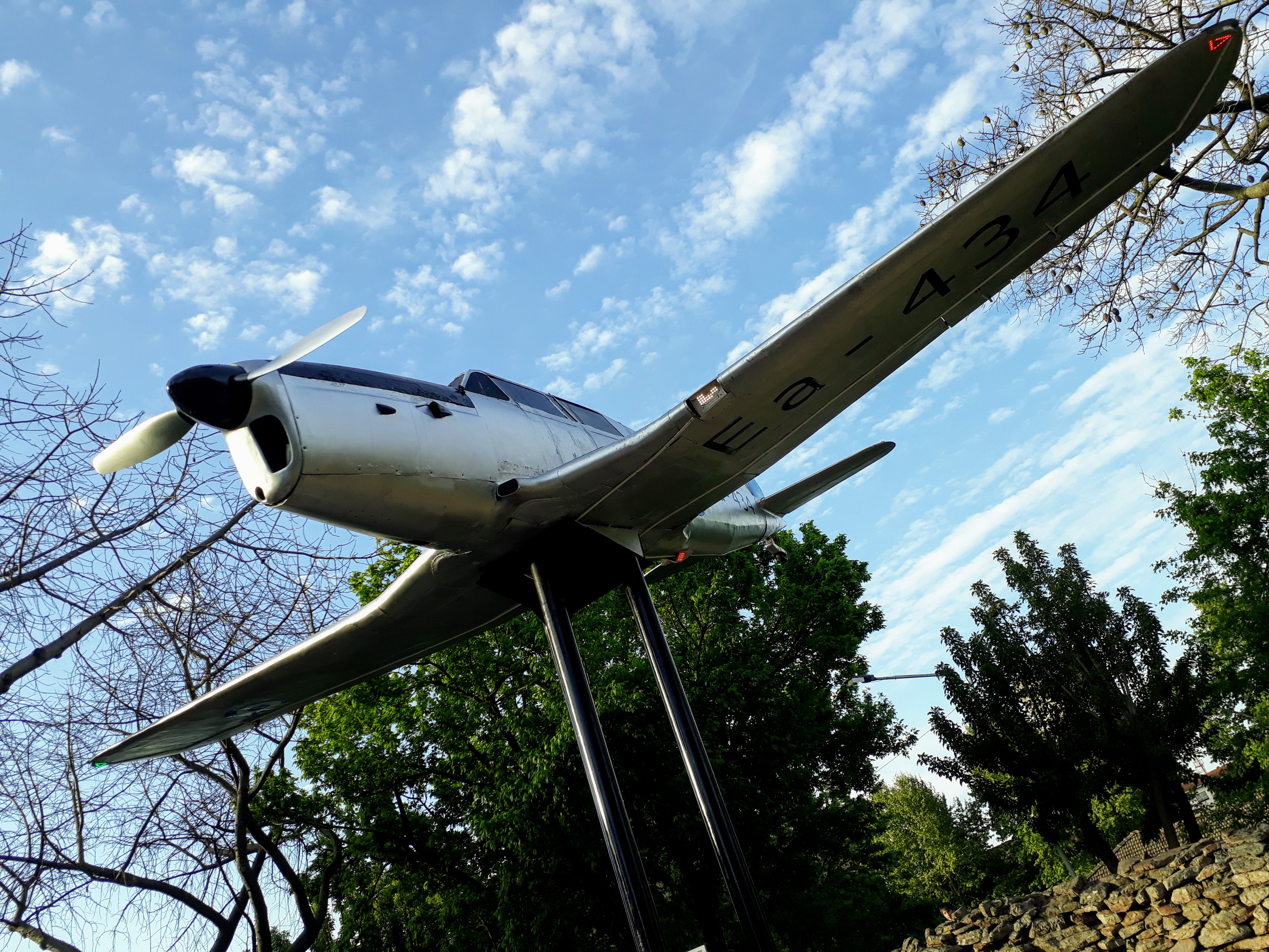 Fiat G-46, monoplano biplaza de entrenamiento avanzado (1947). Instalado en 1960 en la "Plaza de los Aviadores".